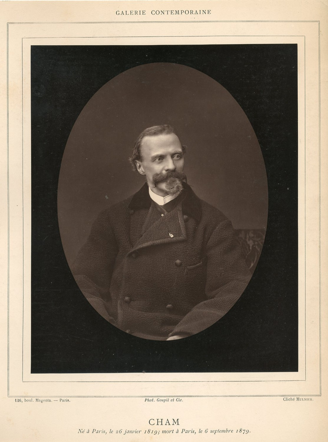 French illustrator and caricaturist Amédée de Noé a.k.a. Cham (1818-1879)